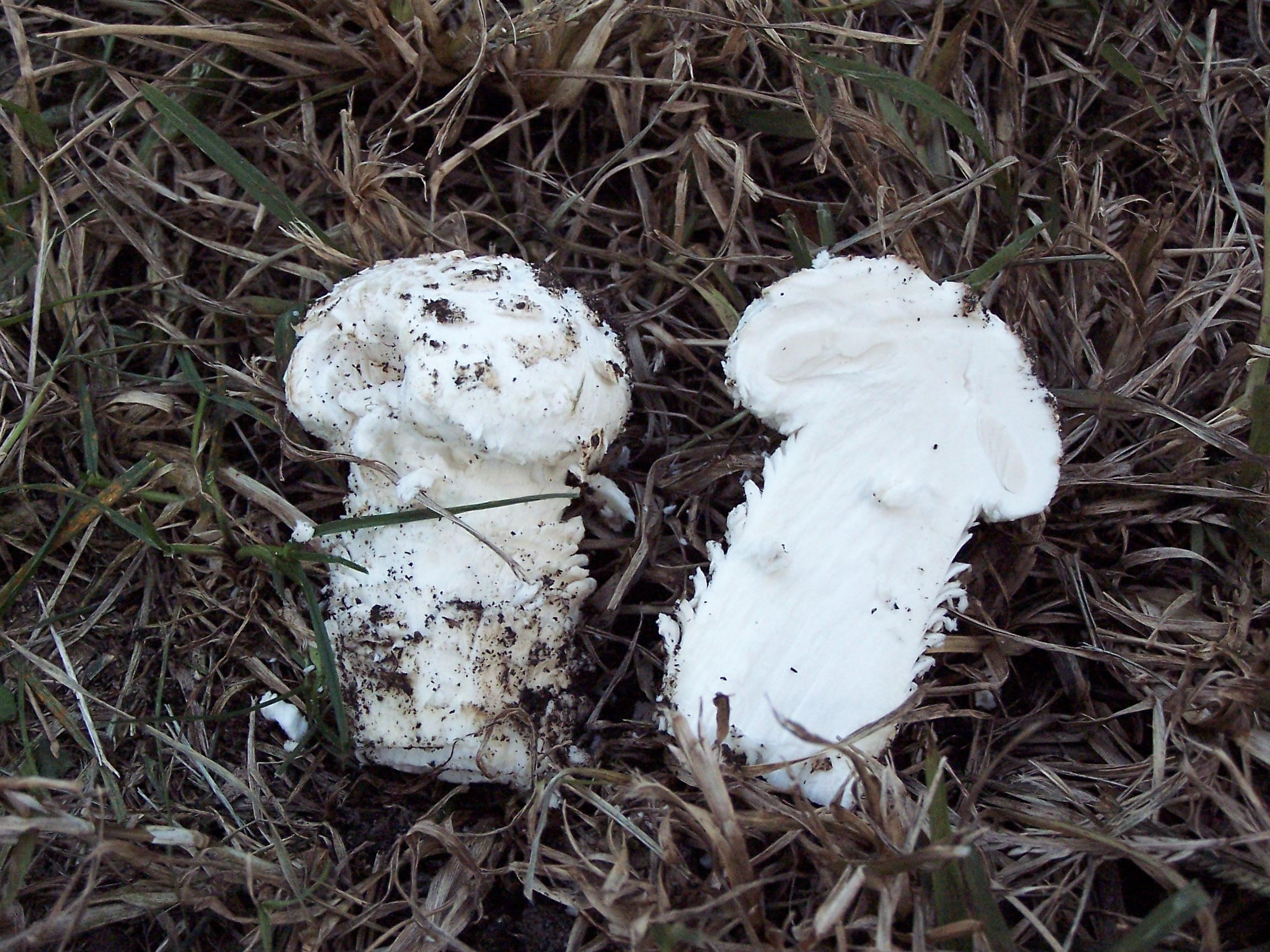 Amanita vittadini